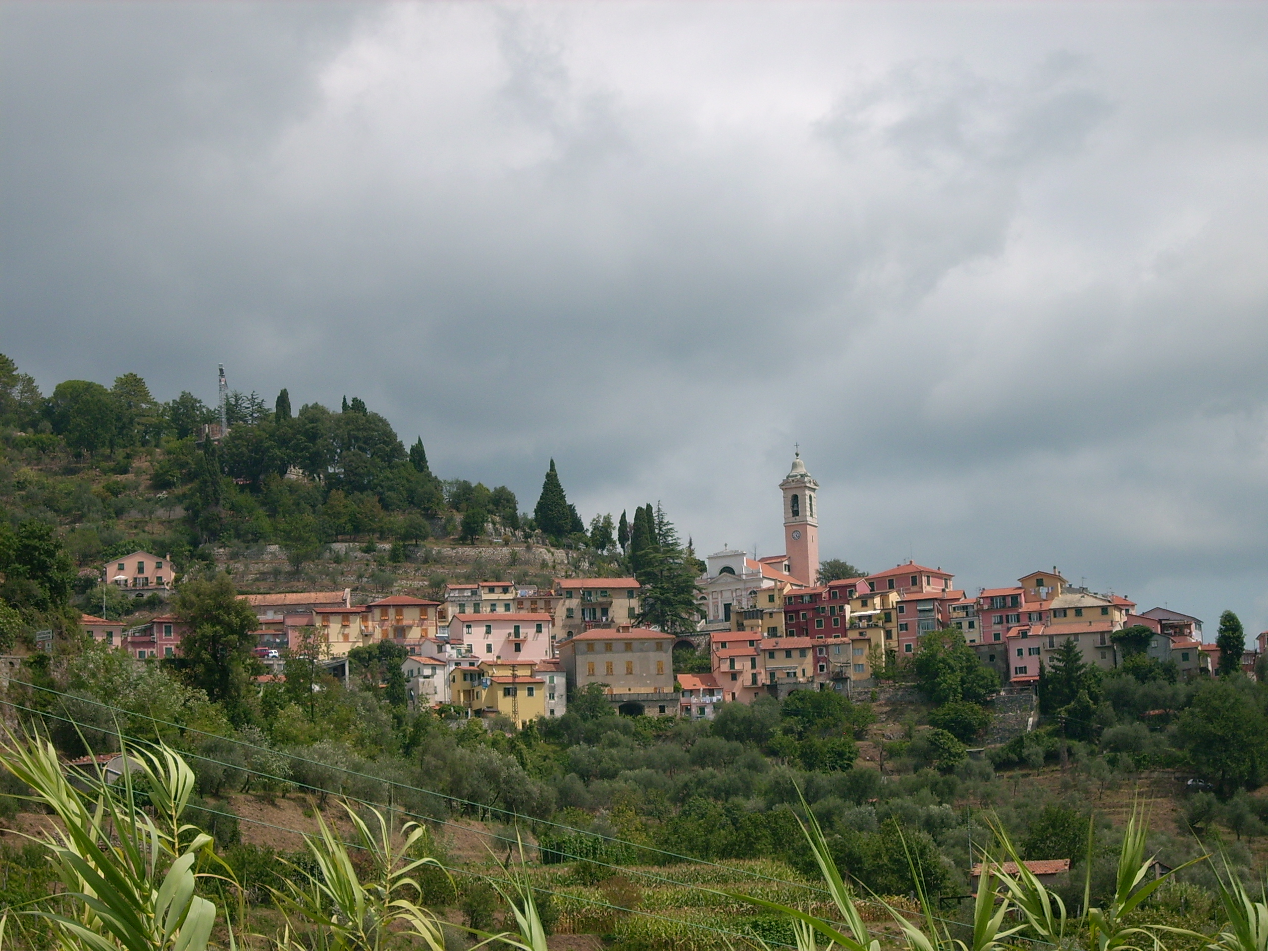 Panorama di Castiglione Chiavarese, Liguria, Italia